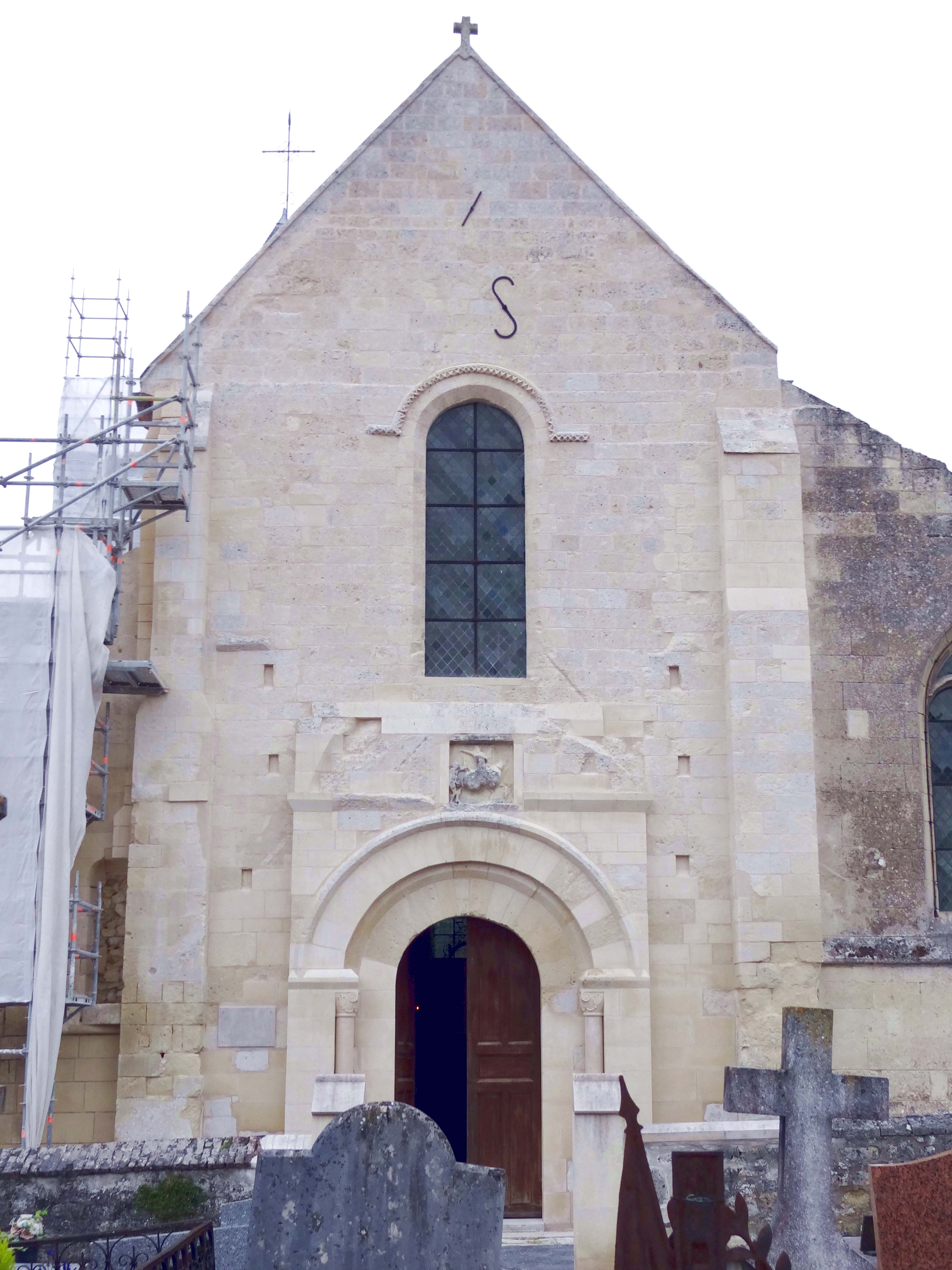 Église Saint-Martin de Bonneuil-en-Valois - voir titre.